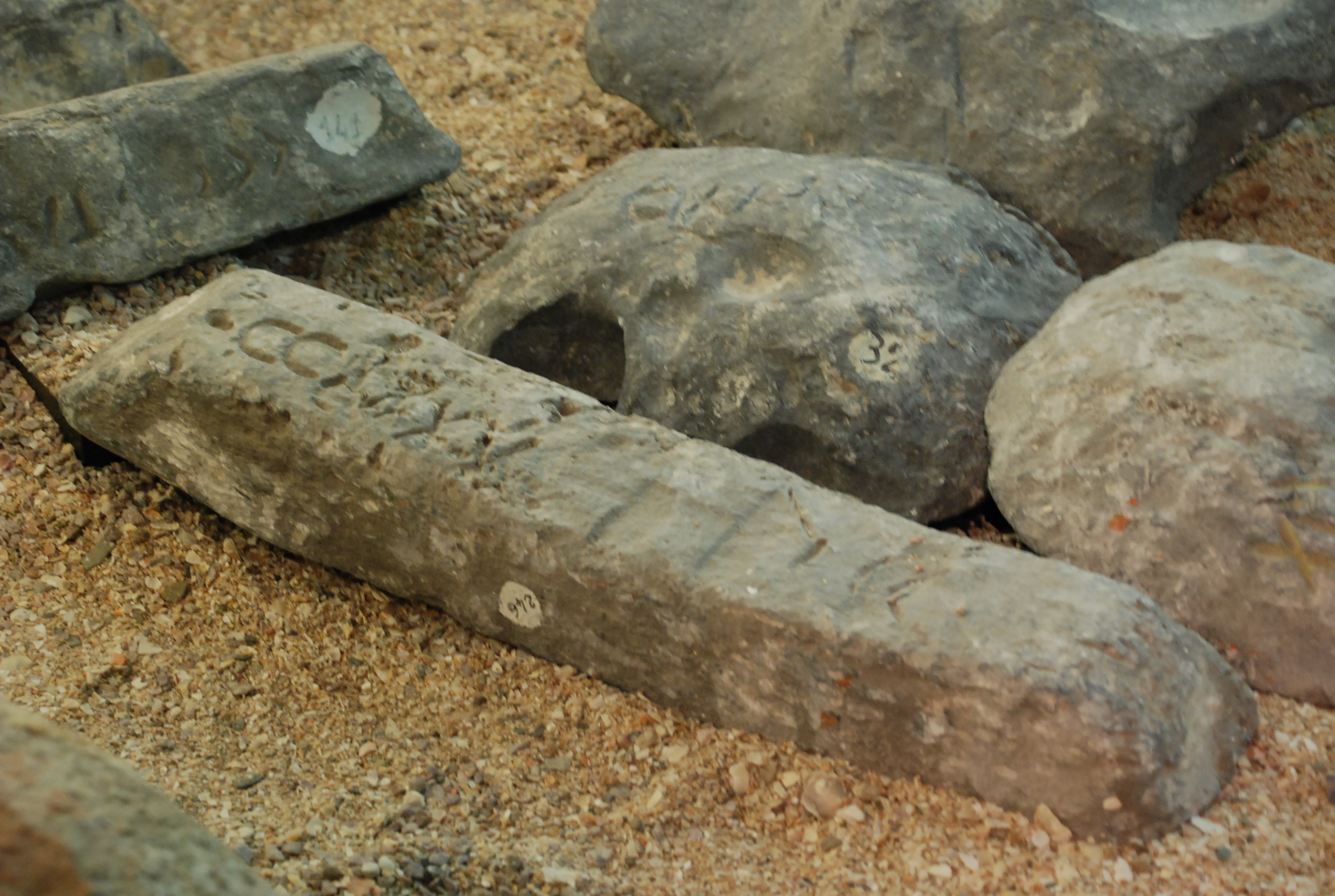 Détail de lingots de l'épave de Ploumanarc'h exposés au Musée d'Art et d'Histoire de Saint-Brieuc.